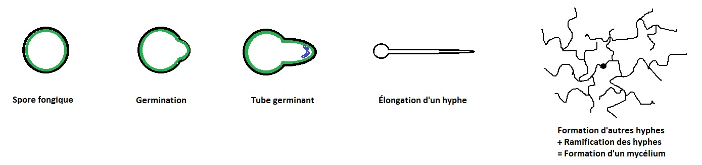 Une simple spore peut former un réseau complexe de filaments via la germination, l'élongation des hyphes et la ramification de ceux-ci.